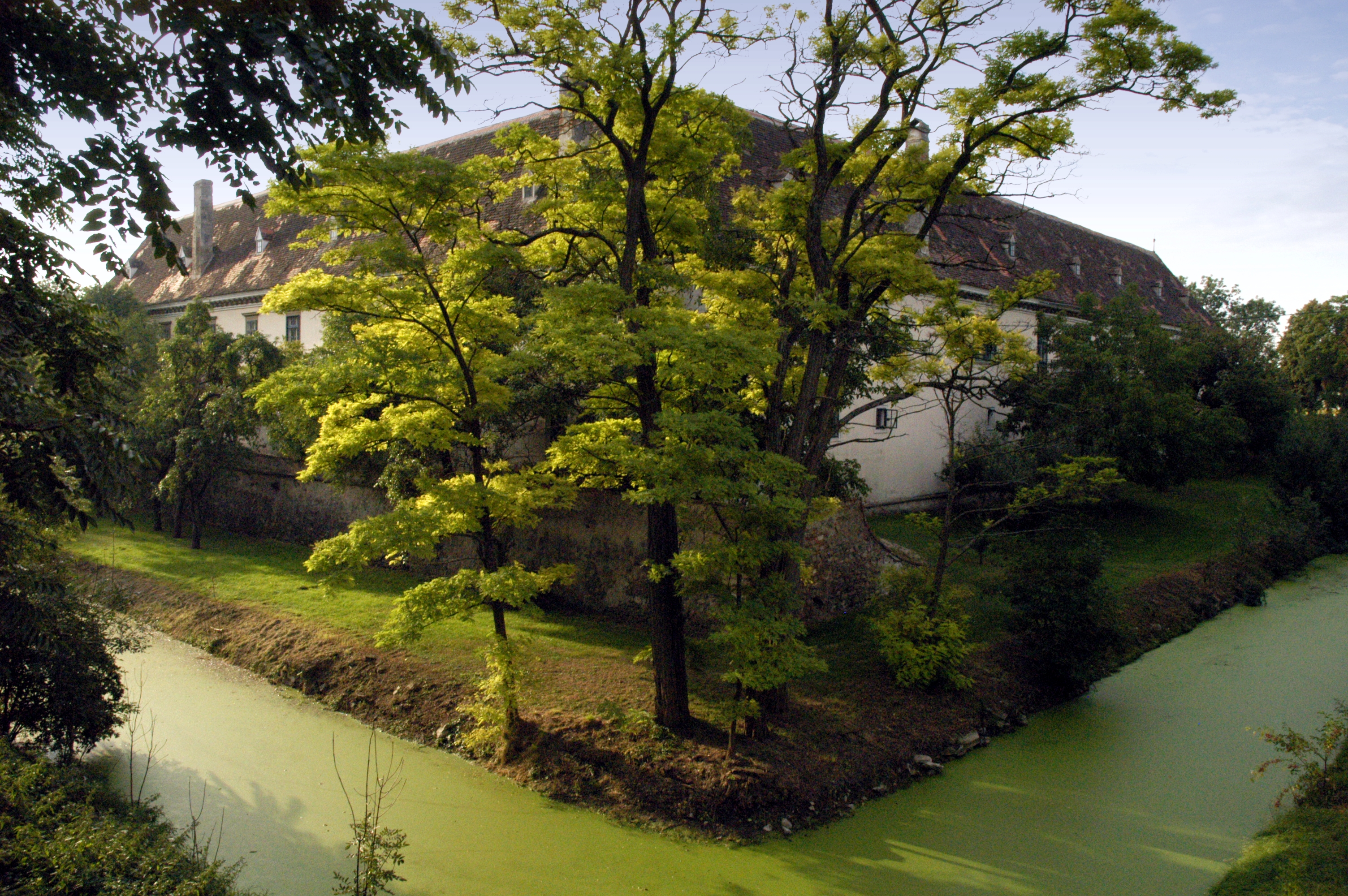 ehemaliges Wasserschloss in Guntersdorf